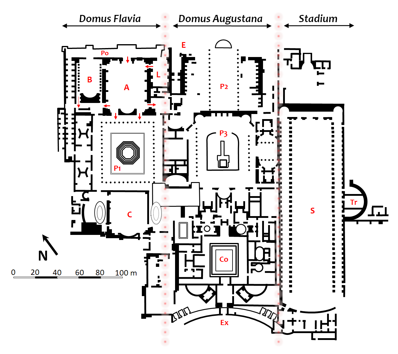 Plan du palais de Tibère.